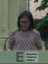 El monumento de Emilia Pardo Bazán situado en los jardines de la calle Princesa que llevan su nombre, frente al Palacio de Liria, ha abierto una nueva edición del ciclo ‘Nuestras estatuas hablan’. La dramaturga Anna R. Costa y la actriz Pilar Gómez han sido, en esta ocasión, las encargadas de poner voz a la escultura con la lectura dramatizada de una selección de textos de la escritora. También han interpretado fragmentos de la obra Emilia, una producción de Teatro del Barrio realizada íntegramente por mujeres, en la que se destaca la labor de esta polifacética intelectual como precursora de los derechos de las mujeres y por la que Costa y Gómez están nominadas a los Premios Max 2018, en las categorías de Mejor Autoría Teatral y mejor Actriz respectivamente.